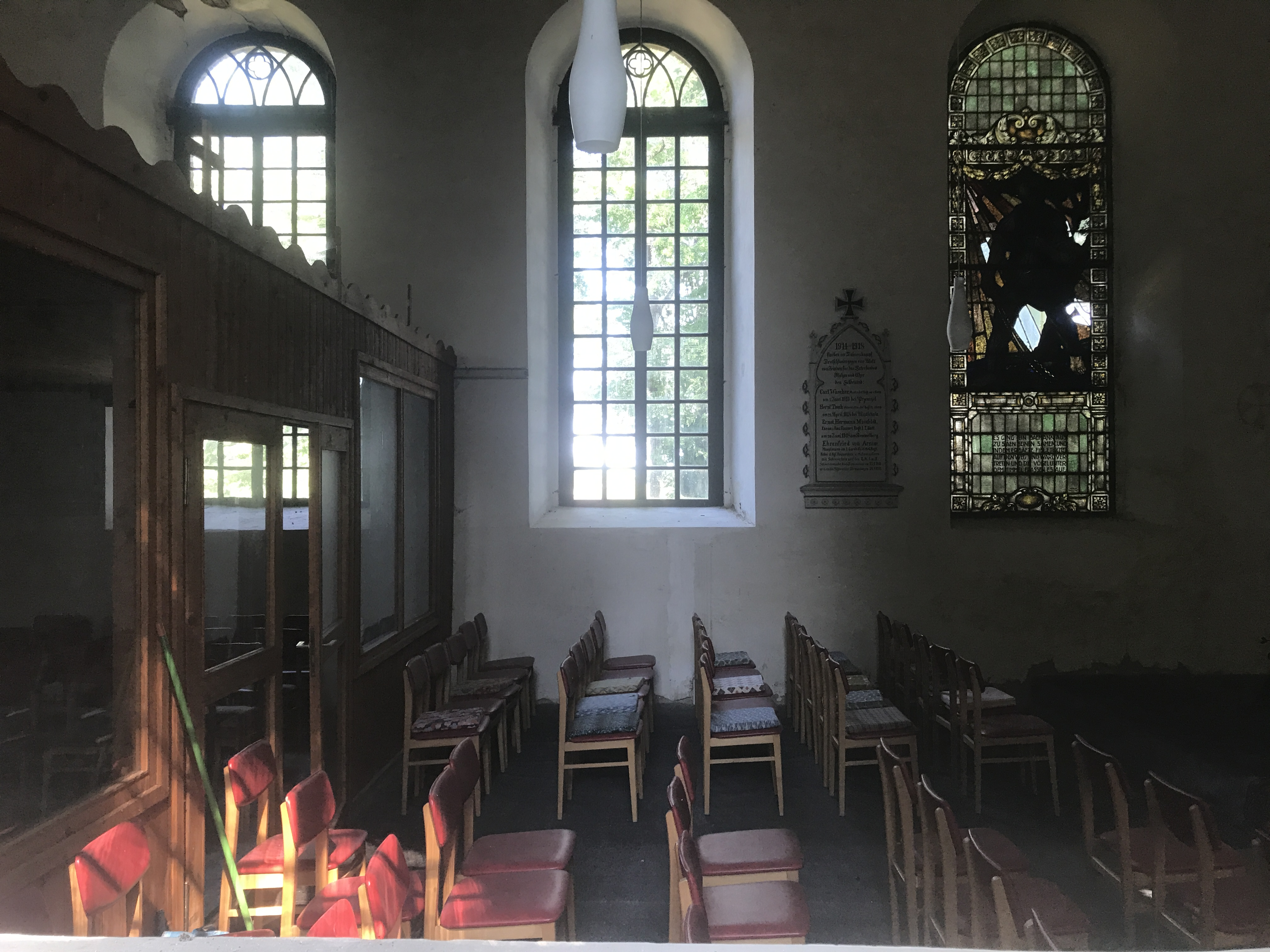 Die Dorfkirche Güterberg ist eine Saalkirche in Güterberg, einem Ortsteil der Gemeinde Uckerland im Landkreis Uckermark in Brandenburg. Die Kirchenausstattung ist bauzeitlich.